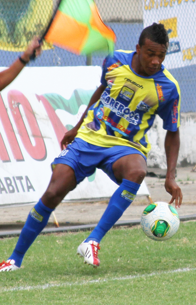 Marcos Cangá en un partido con la camiseta de Delfín en 2013